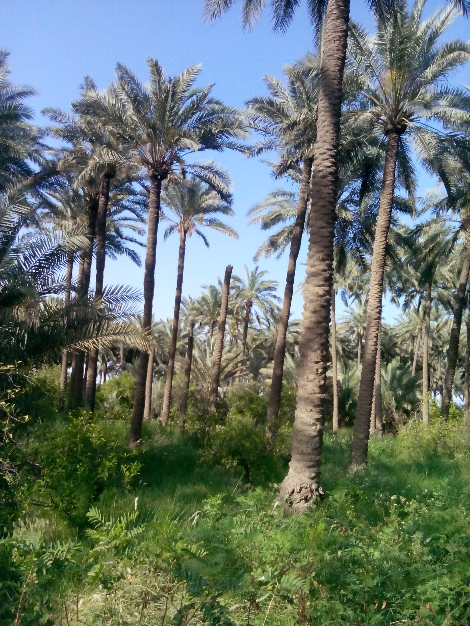 بستان نخيل في قرية تابعة لناحية المحمودية (الأسود) في مدينة الخالص شرق العراق